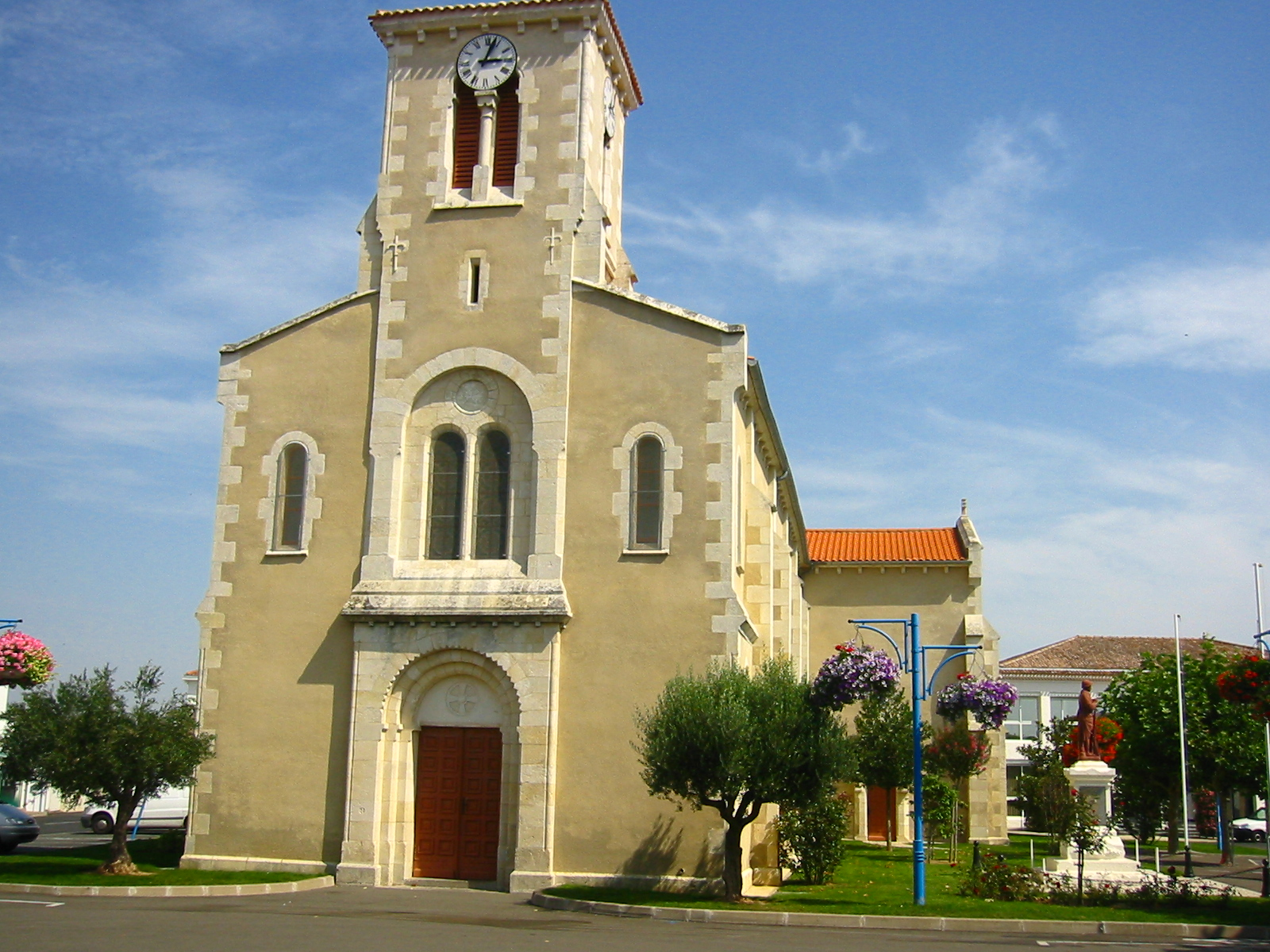 L'église de La Tranche-sur-Mer (Vendée, France).